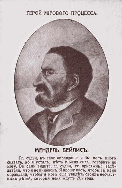 Герой мирового процесса Мендель Бейлис". Почтовая открытка.